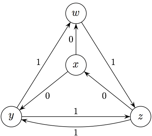 Algorithme de johnson étape 4